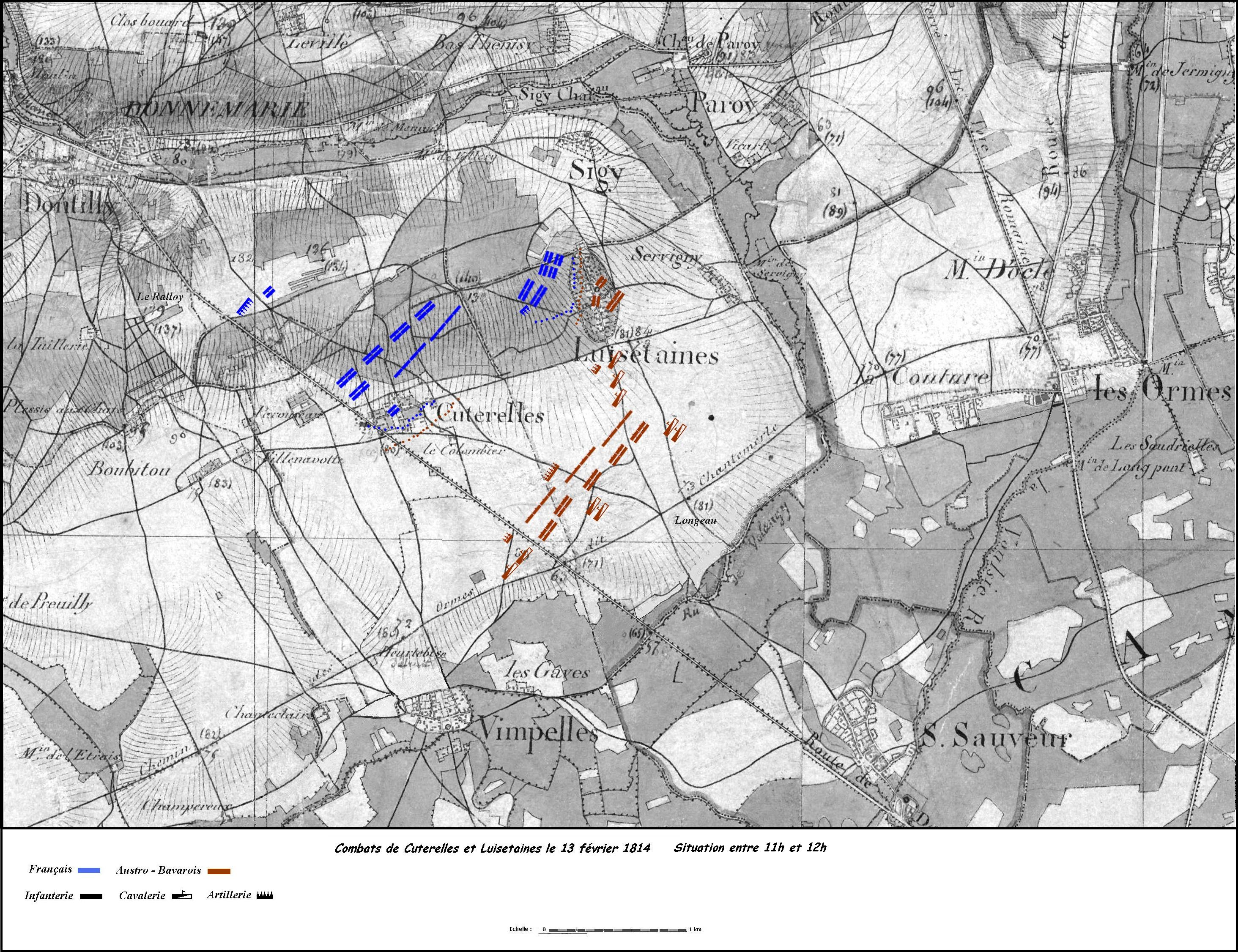 Combats de Cuterelles et Luisetaines - Situation entre 11h et 12h